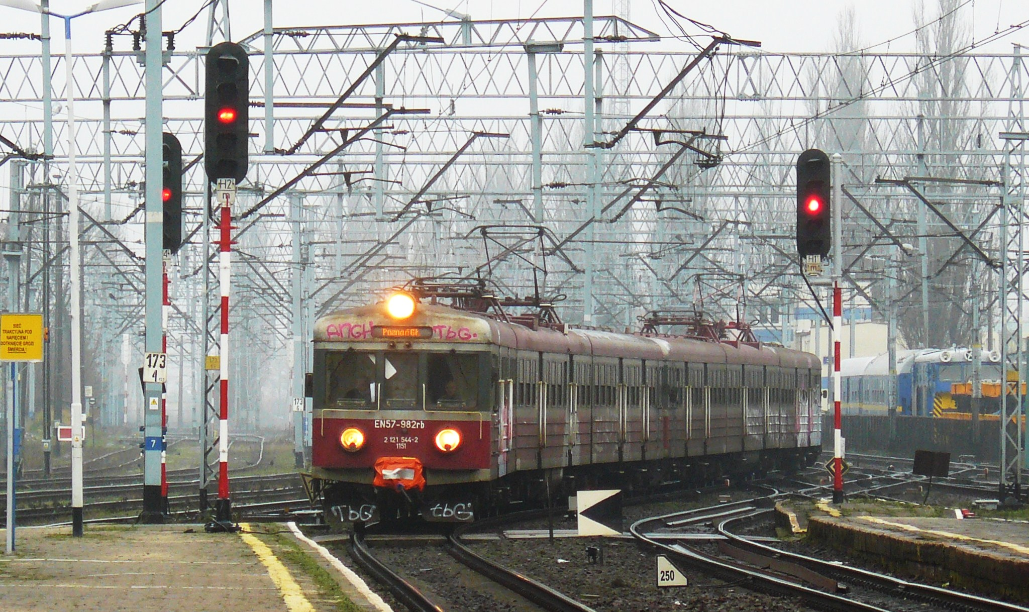 Zespół trakcyjny EN57-982 w Stargardzie Szczecińskim jako pociąg do Poznania.